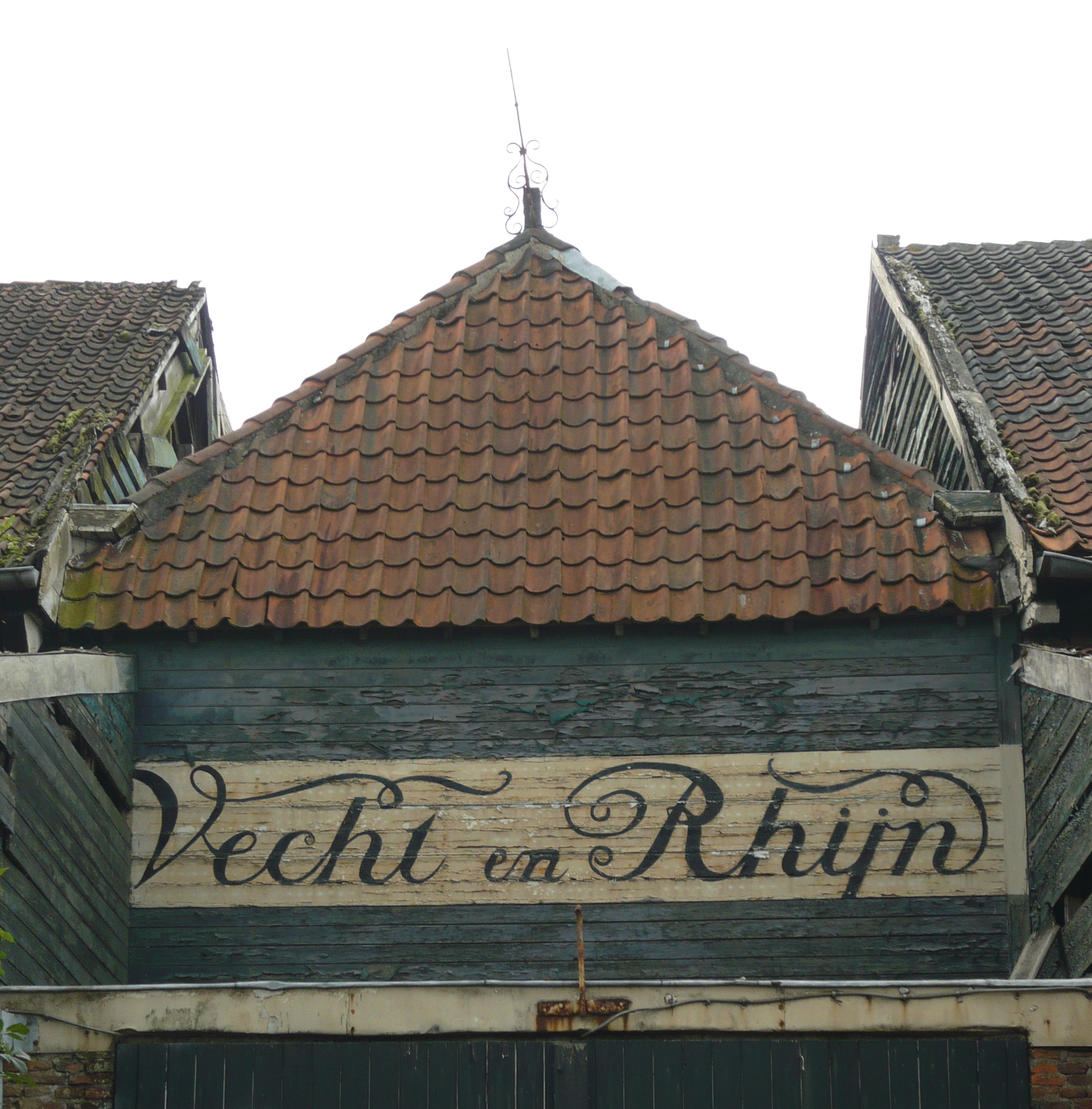 Vecht en Rhijn, detail